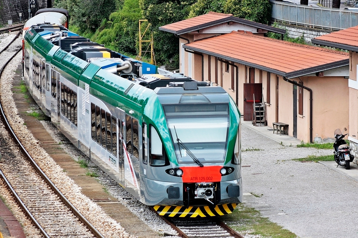 ATR 125.002 in sosta su un binario di Iseo